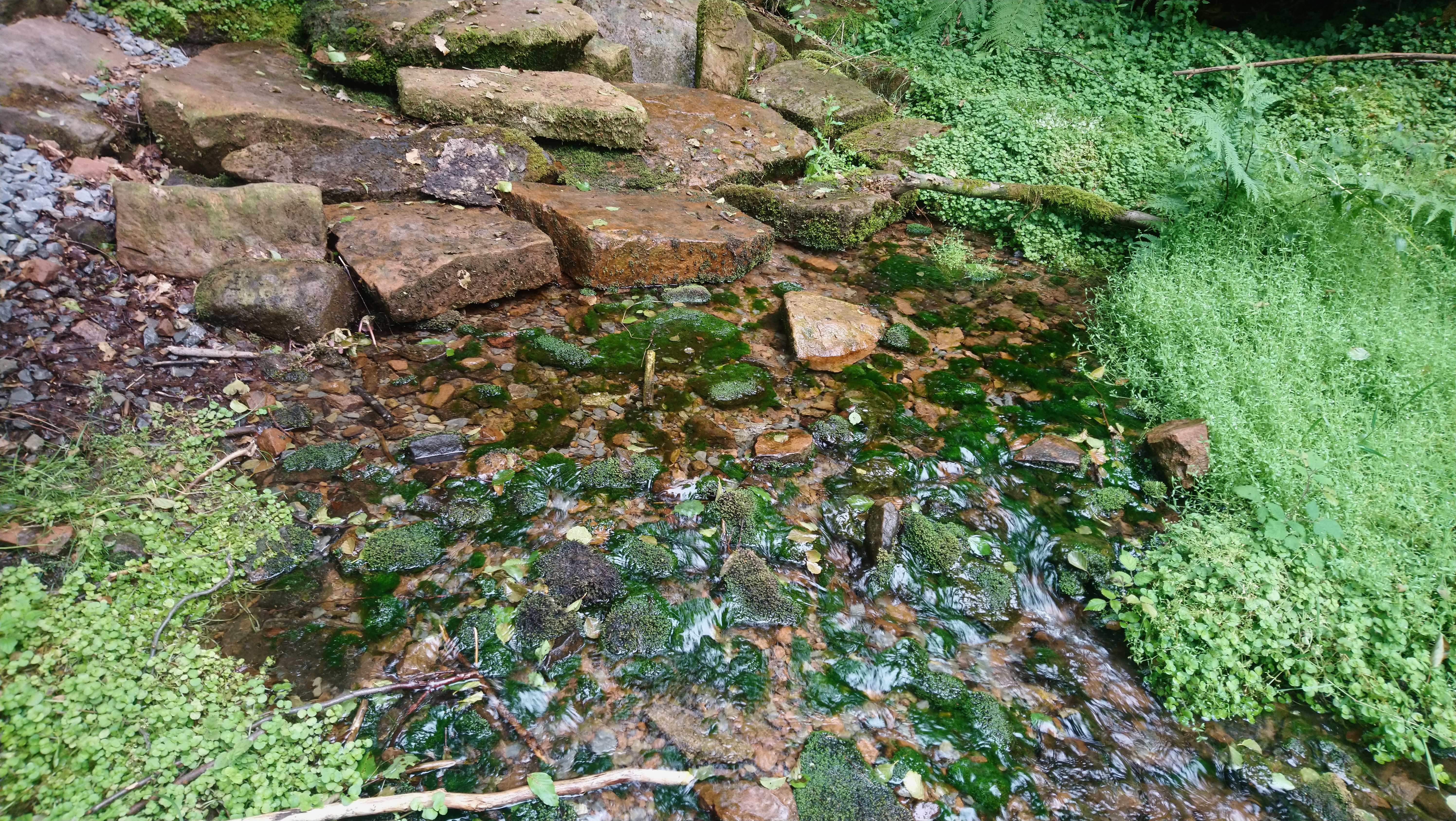 Die Kleinkahlquelle im Naturschutzgebiet Amphibienfreistätte Sommergrund bei Kleinkahl, Bayern. Die Quelle liegt im gemeindefreien Gebiet Schöllkrippener Forst.